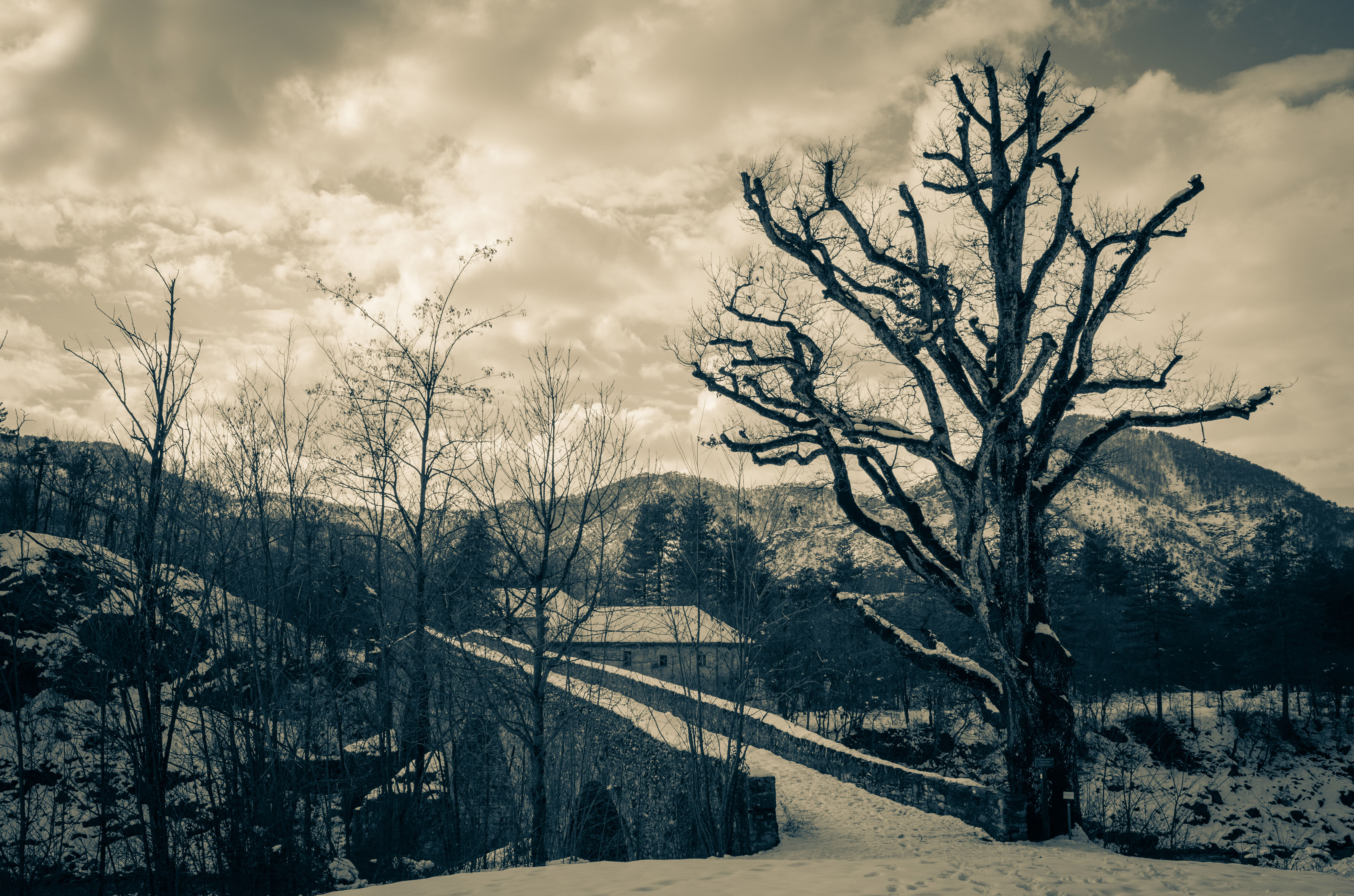 rovere This is a photo of a monument which is part of cultural heritage of Italy.